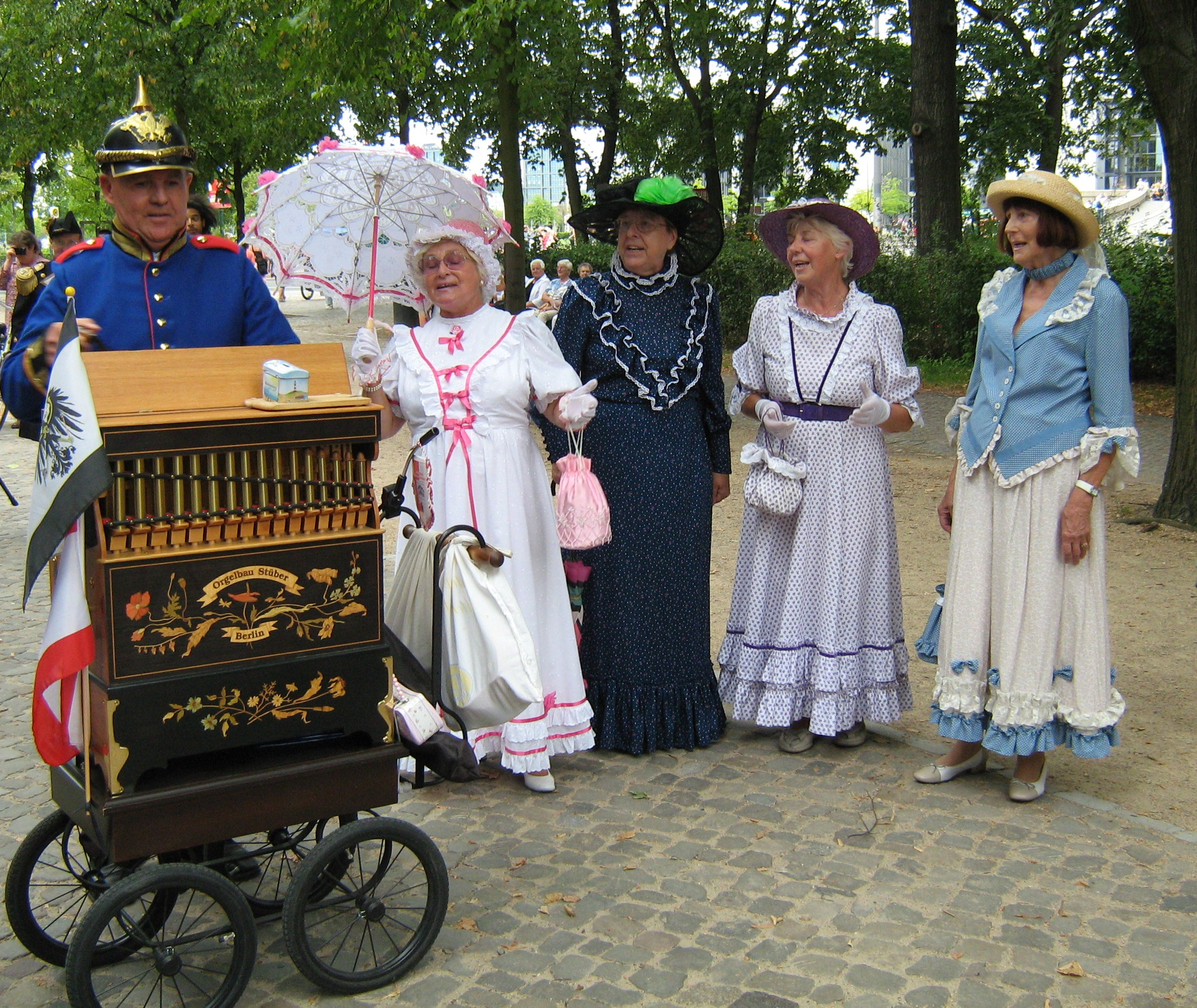 Kaiserliche Zeit (Historische Trachten in Berlin 2009)